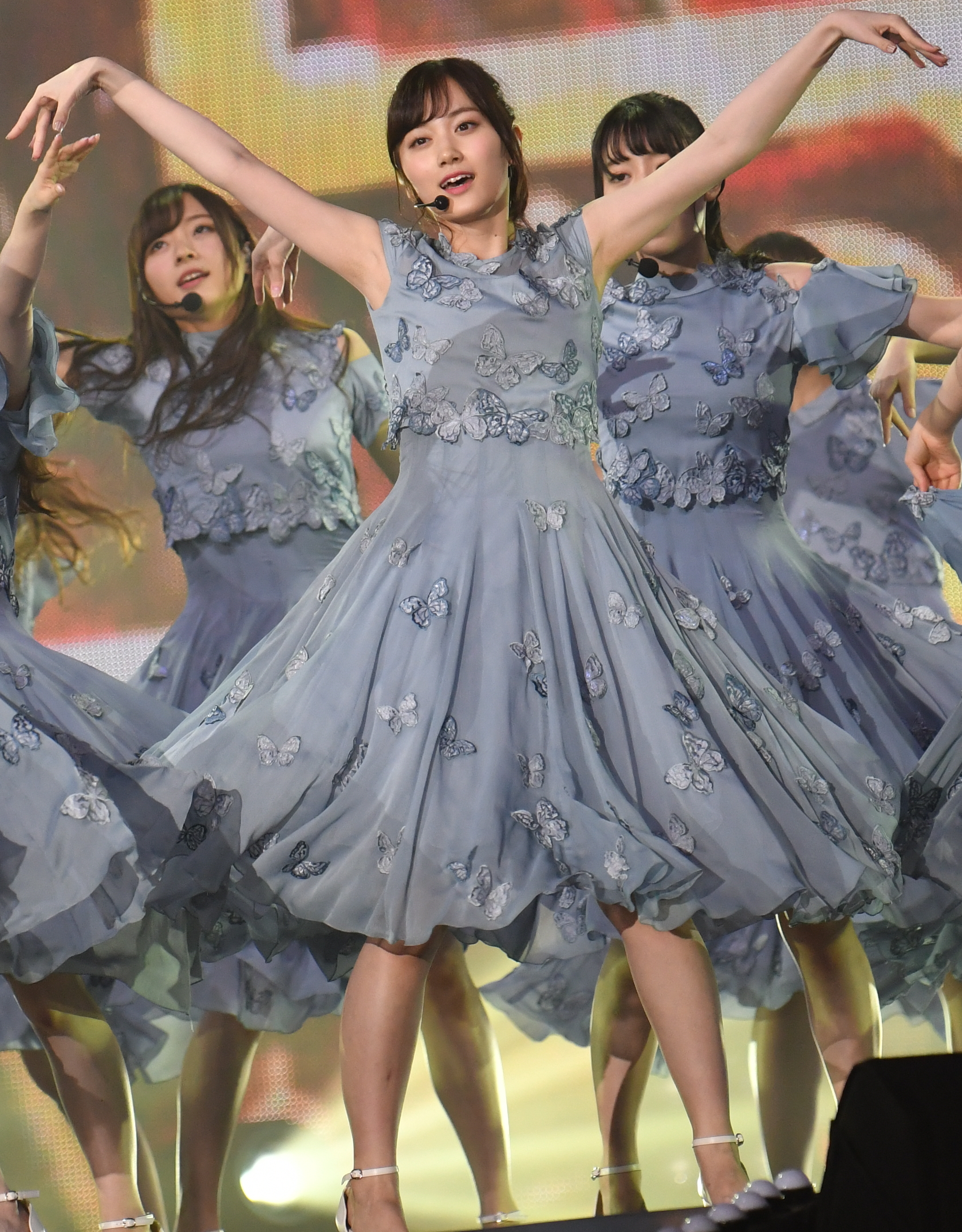 2019.01.26「第14回 KKBOX MUSIC AWARDS in Taiwan」乃木坂46 @台北小巨蛋